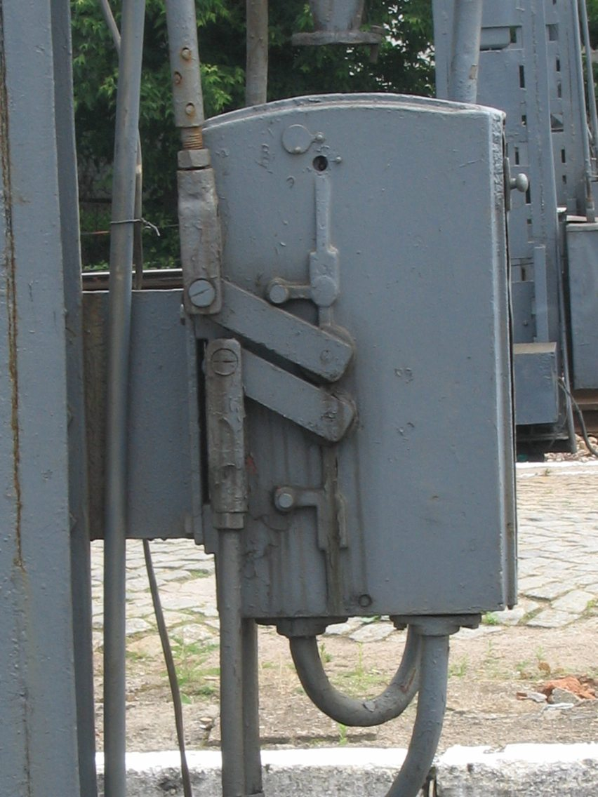 Sprzęgło sygnałowe na semaforze 2M² na stacji Białystok